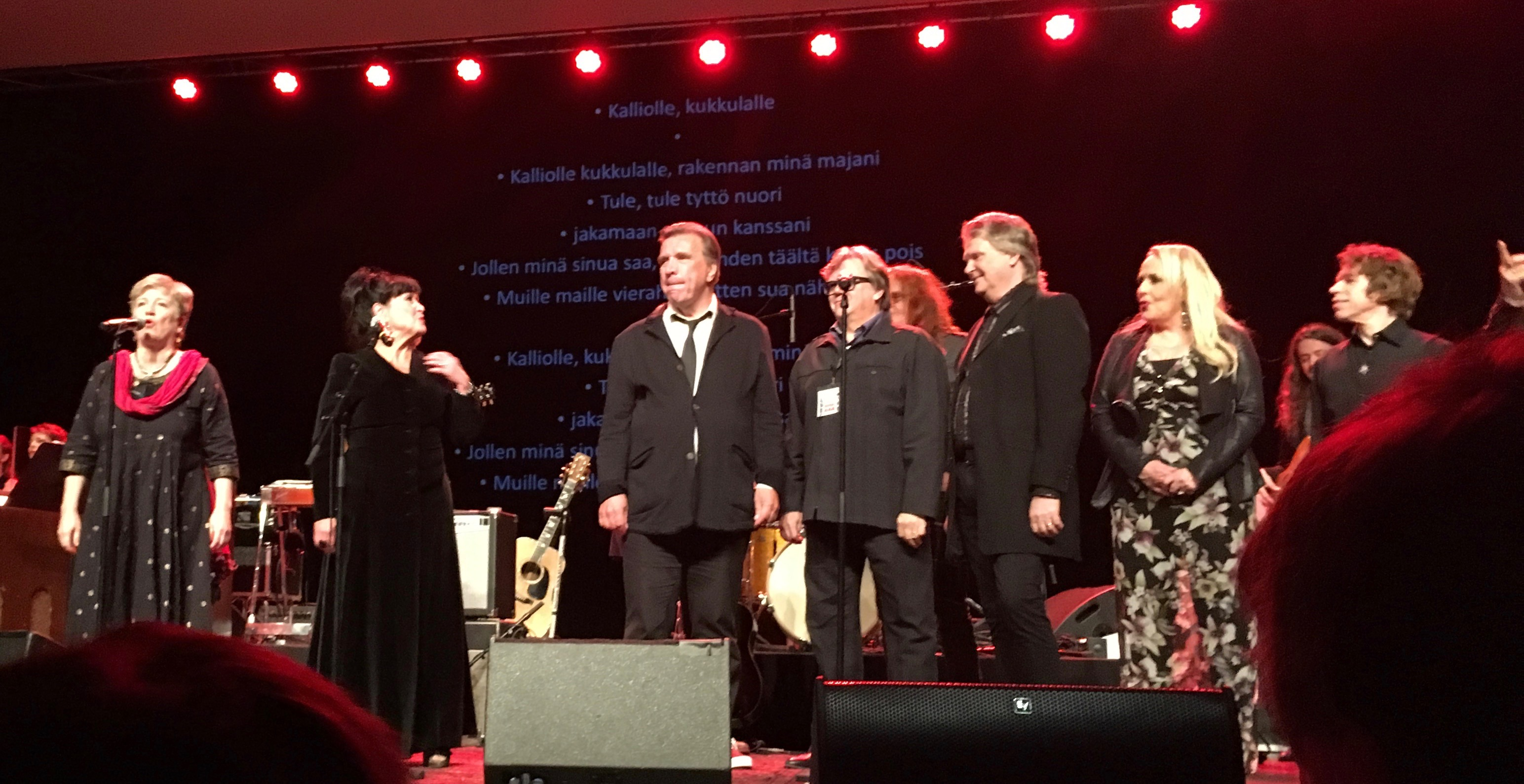 50 vuotta Lovea 24.11.2016. Love Recordsin tähtiä: Eija Ahvo, Sinikka Sokka, Harri Saksala, Mikko Alatalo, Pepe Willberg, Maarit ja Sami Hurmerinta.